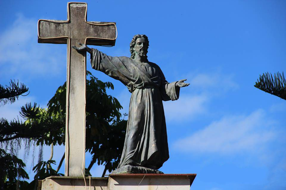 El parque Jesús Maestro fue reconstruido entre 1988 y el año 2014, donde se acondiciono como se encuentra en la actualidad, con variedad de plantas y árboles conservando el verde de la naturaleza, cuenta con una estatua en el centro y sillas de cemento donde se reúnen propios y extraños diariamente para dialogar, tomar un café o pasar un rato, es un punto de encuentro importante, ya que está rodeado de las instituciones más representativas del municipio, como la alcaldía, la parroquia, la notaria la entidad financiera y una serie de establecimientos comerciales